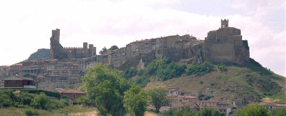 Vista de Frías (Burgos), con el castillo, la Iglesia de San Vicente y las casas colgantes. Tomada por JMSE 09:17 27 ago, 2004 (CEST) el 4 de julio de 2003 y cedida a Wikipedia.